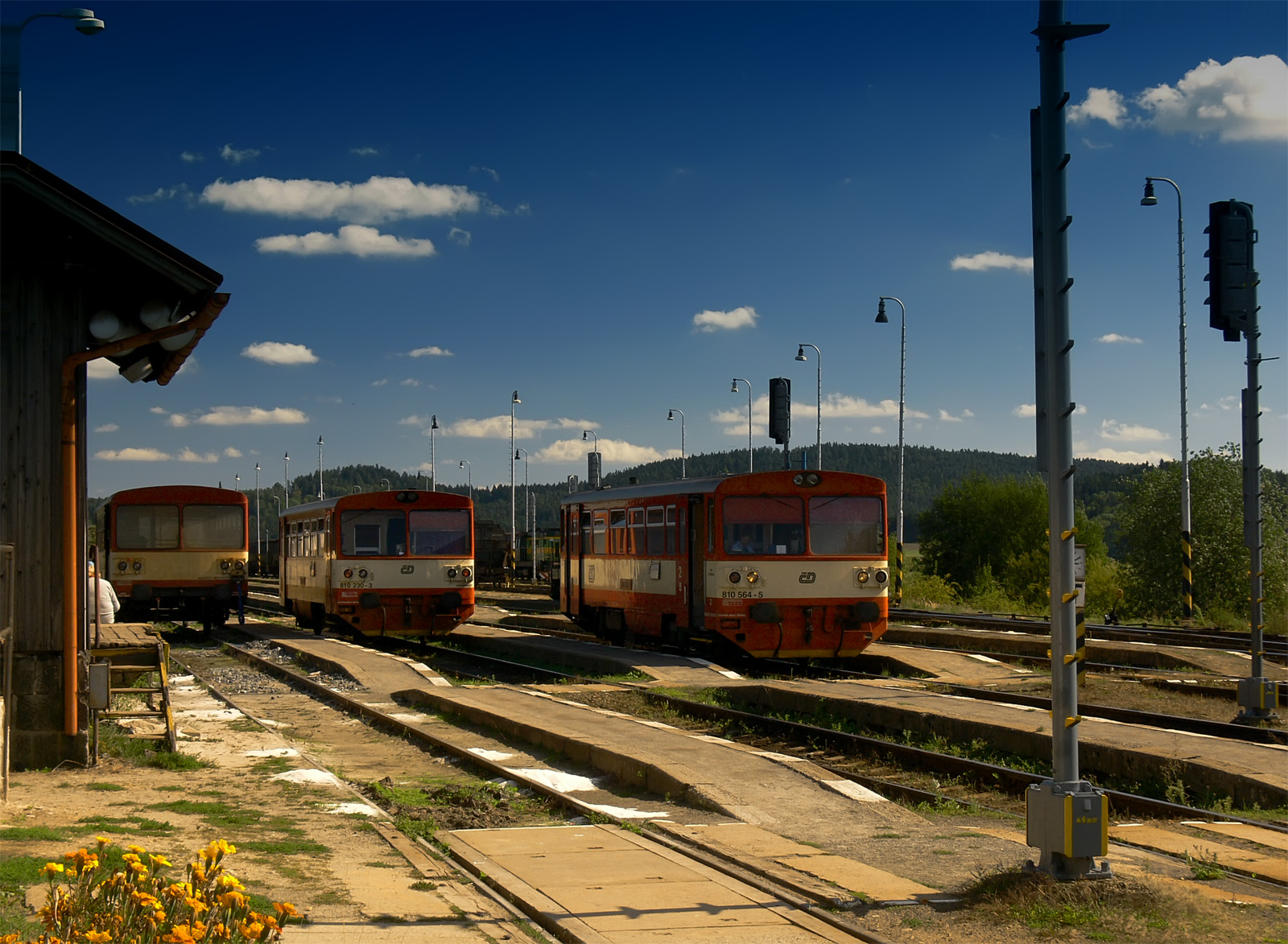 Nádraží Libuň